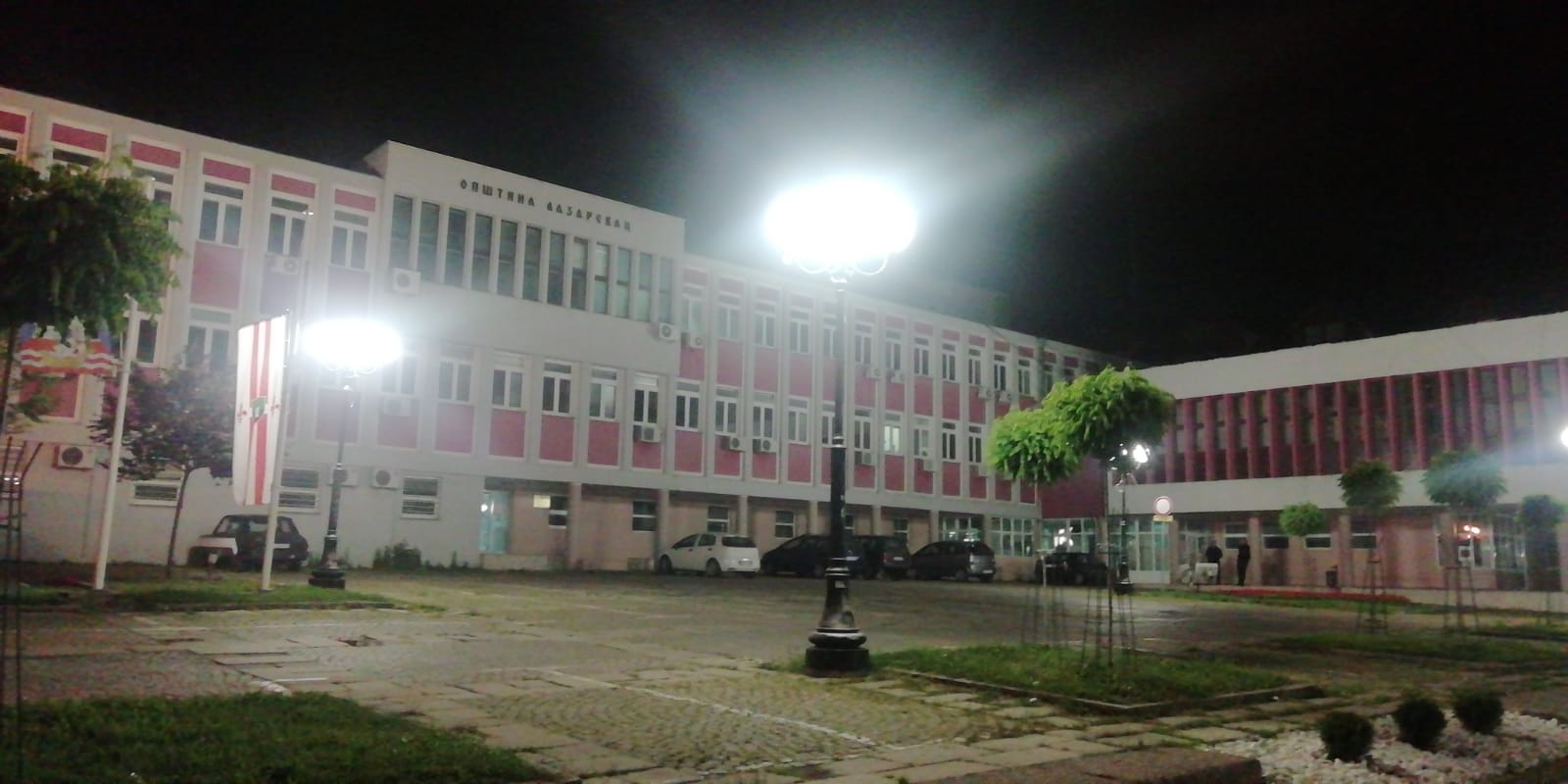 Зграда скупштине општине Лазаревац